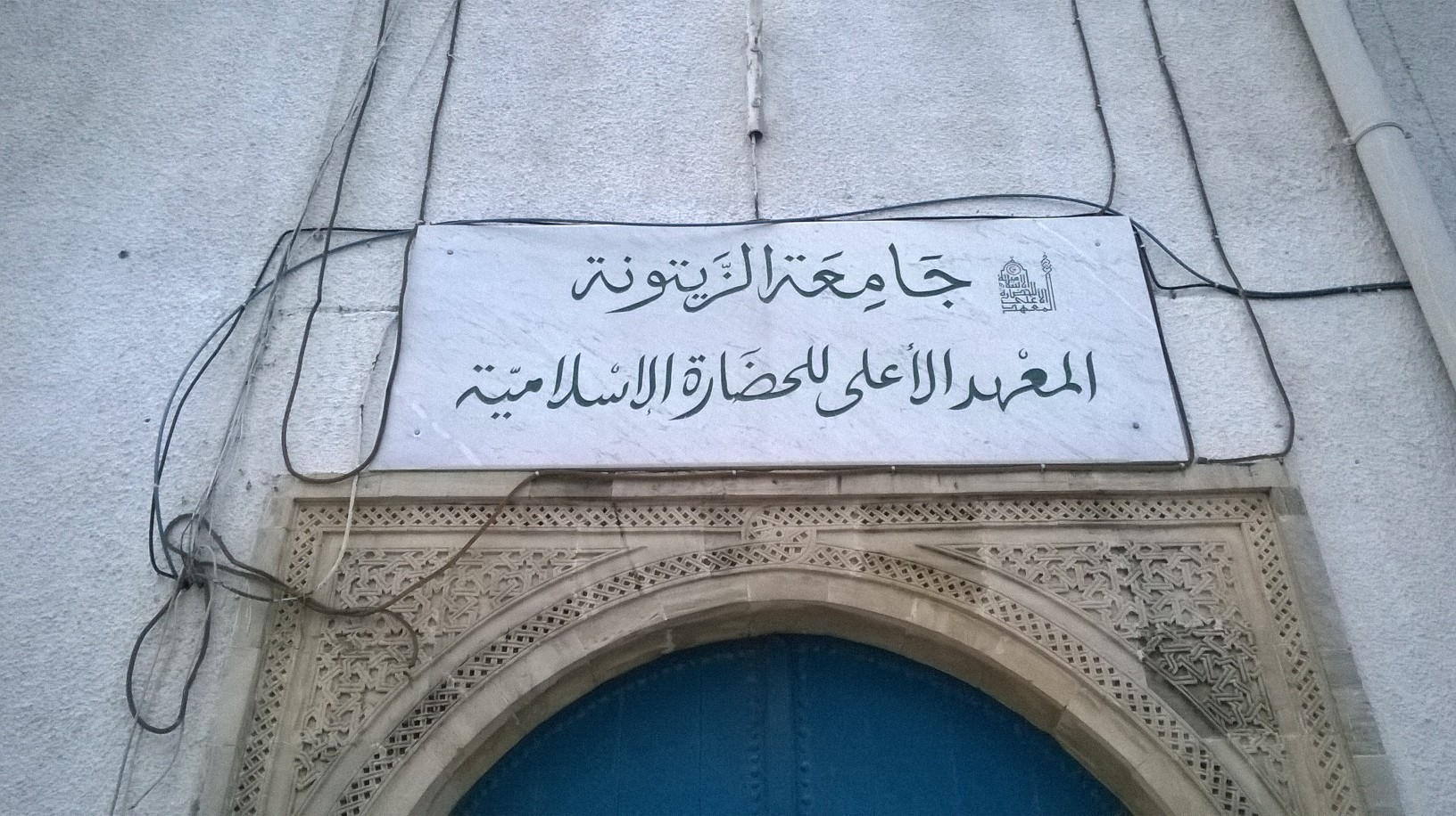 Bab Sidi Kacem, la médina de Tunis باب سيدي قاسم الجليزي ، مدينة تونس العتيقة